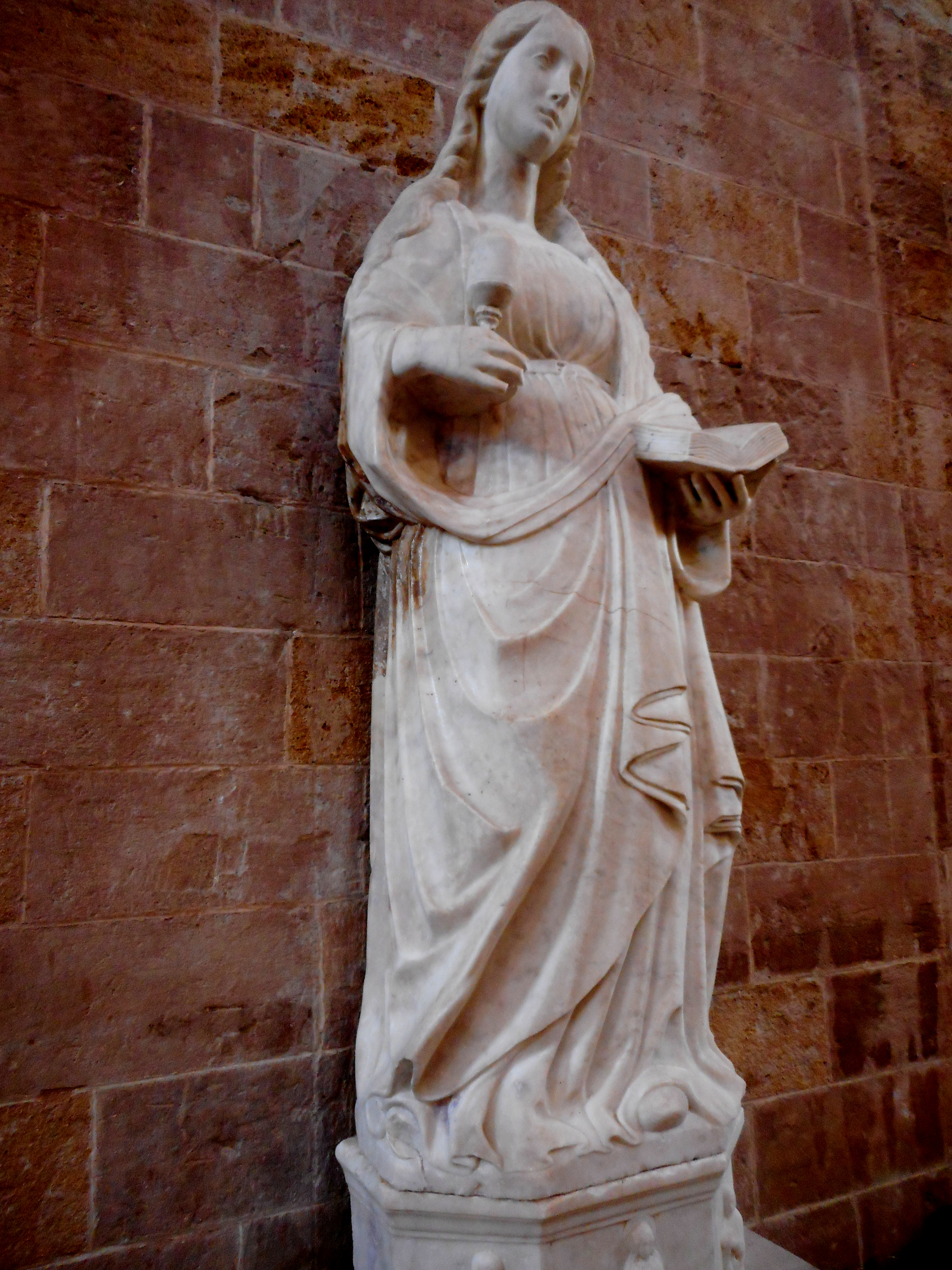 Statua di scuola gaginiana di Santa Maria Maddalena